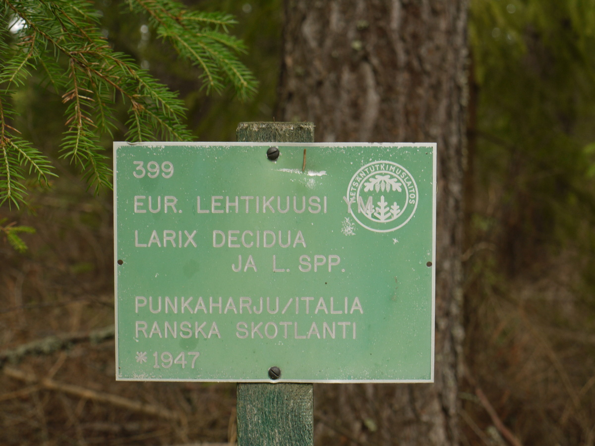 Arboretum Punkaharju: Infotafel der Versuchspflanzung, Parzelle 399